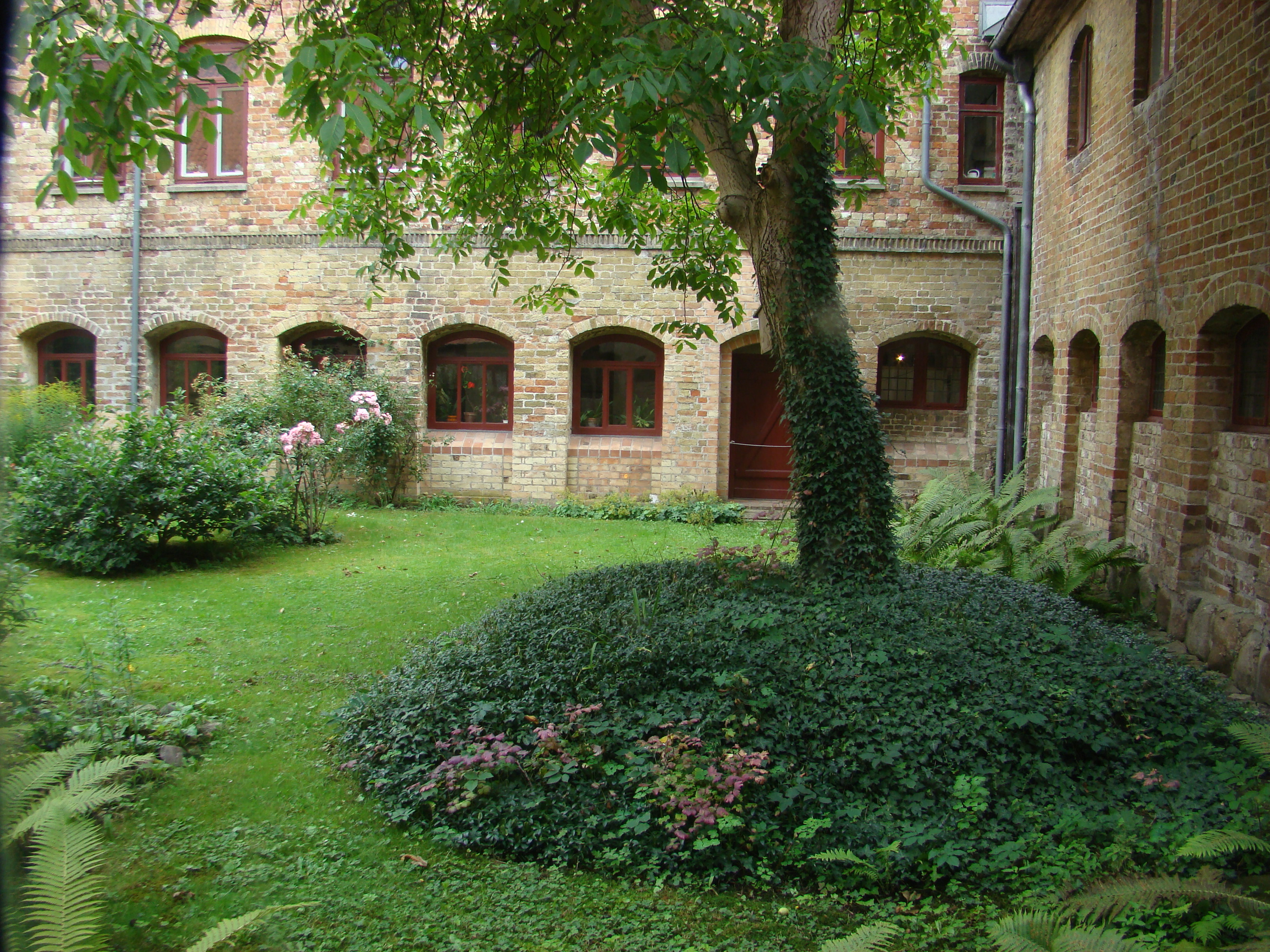 Innenhof des Klosters St.Johannis Schleswig